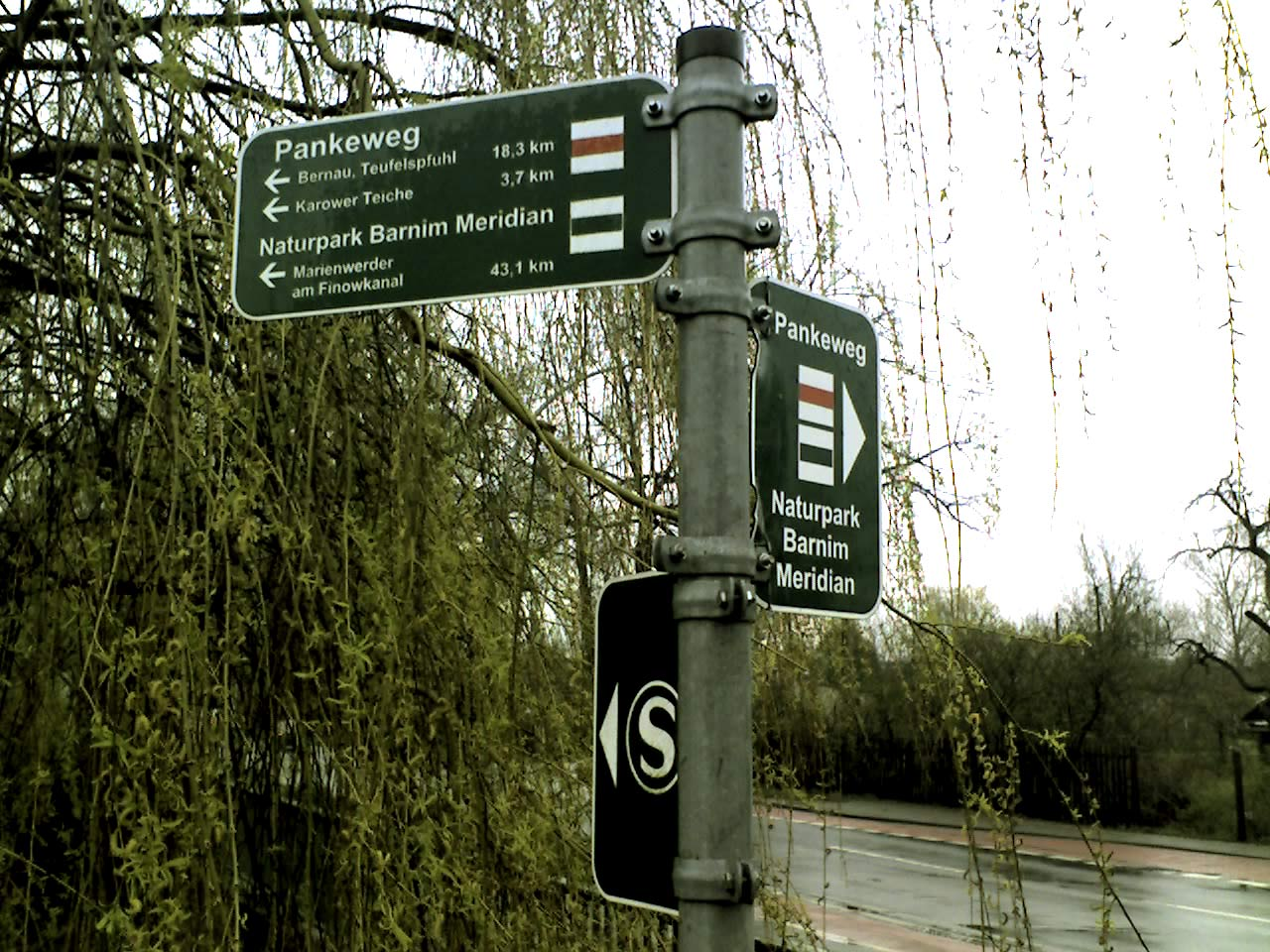 Der Pankewanderweg an der Bahnhofstraße in Französisch Buchholz